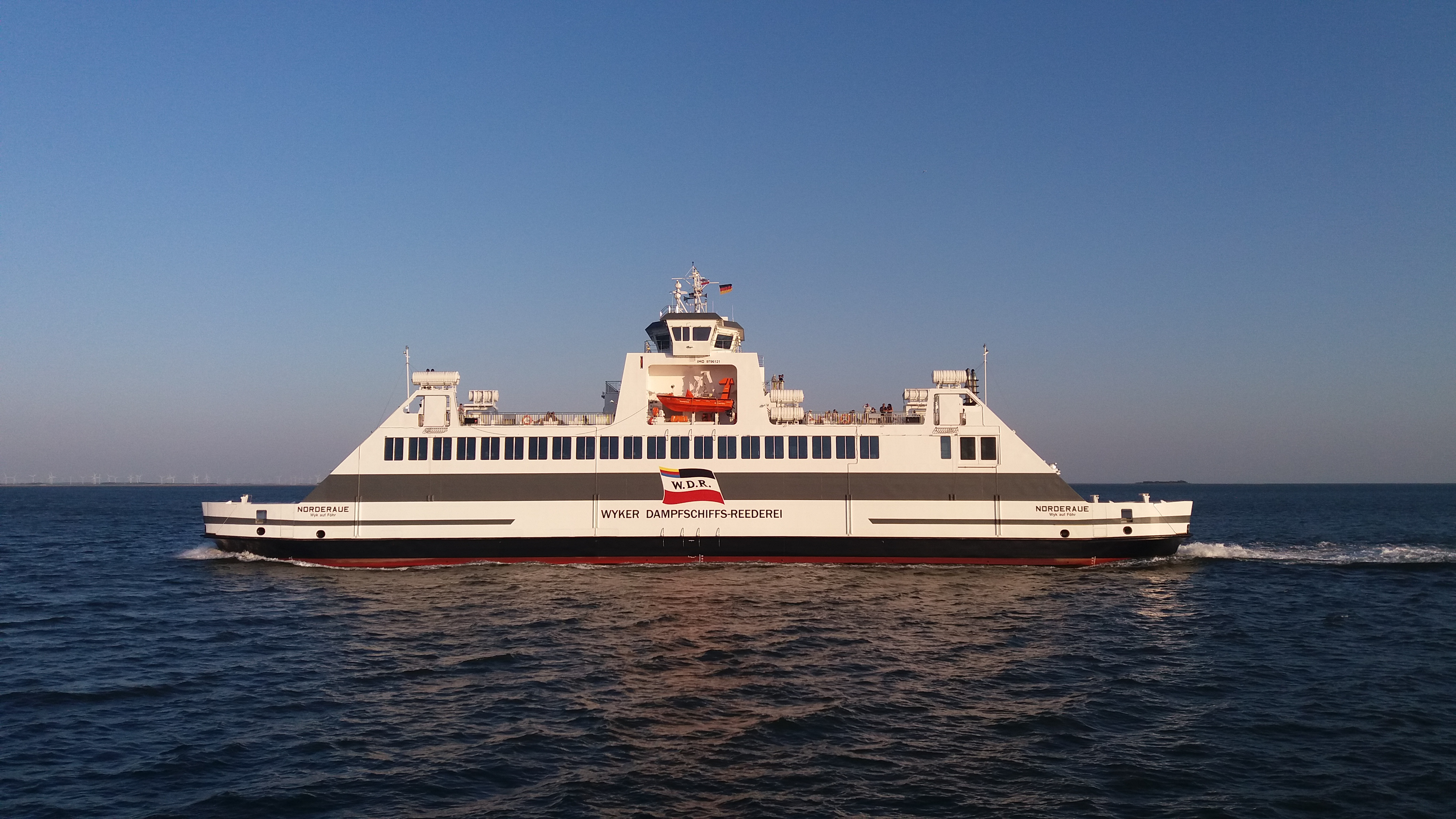 Die Norderaue auf der Fahrt von Dagebüll durch das nordfriesische Wattenmeer